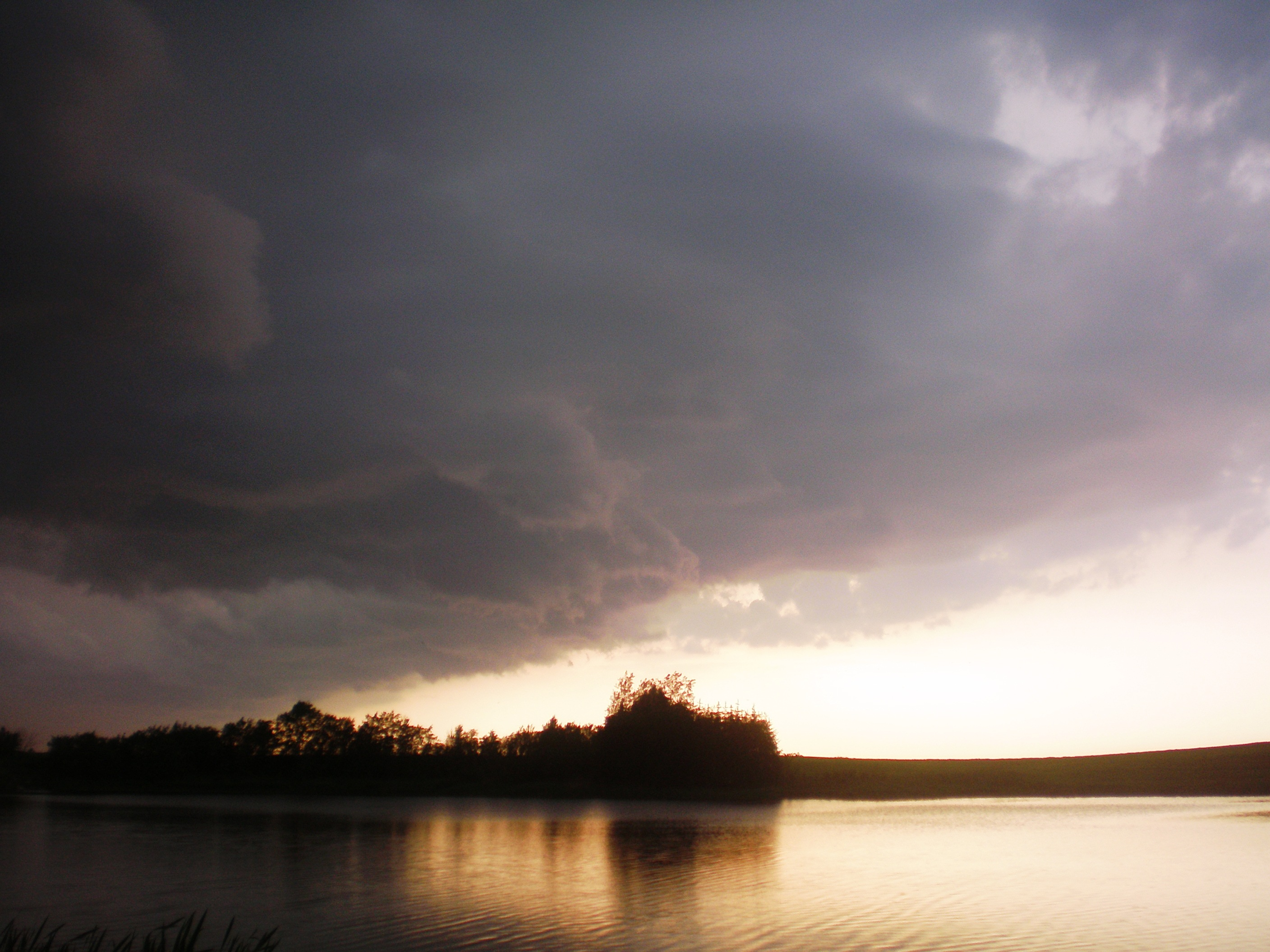 Žemaitėška: Oudra